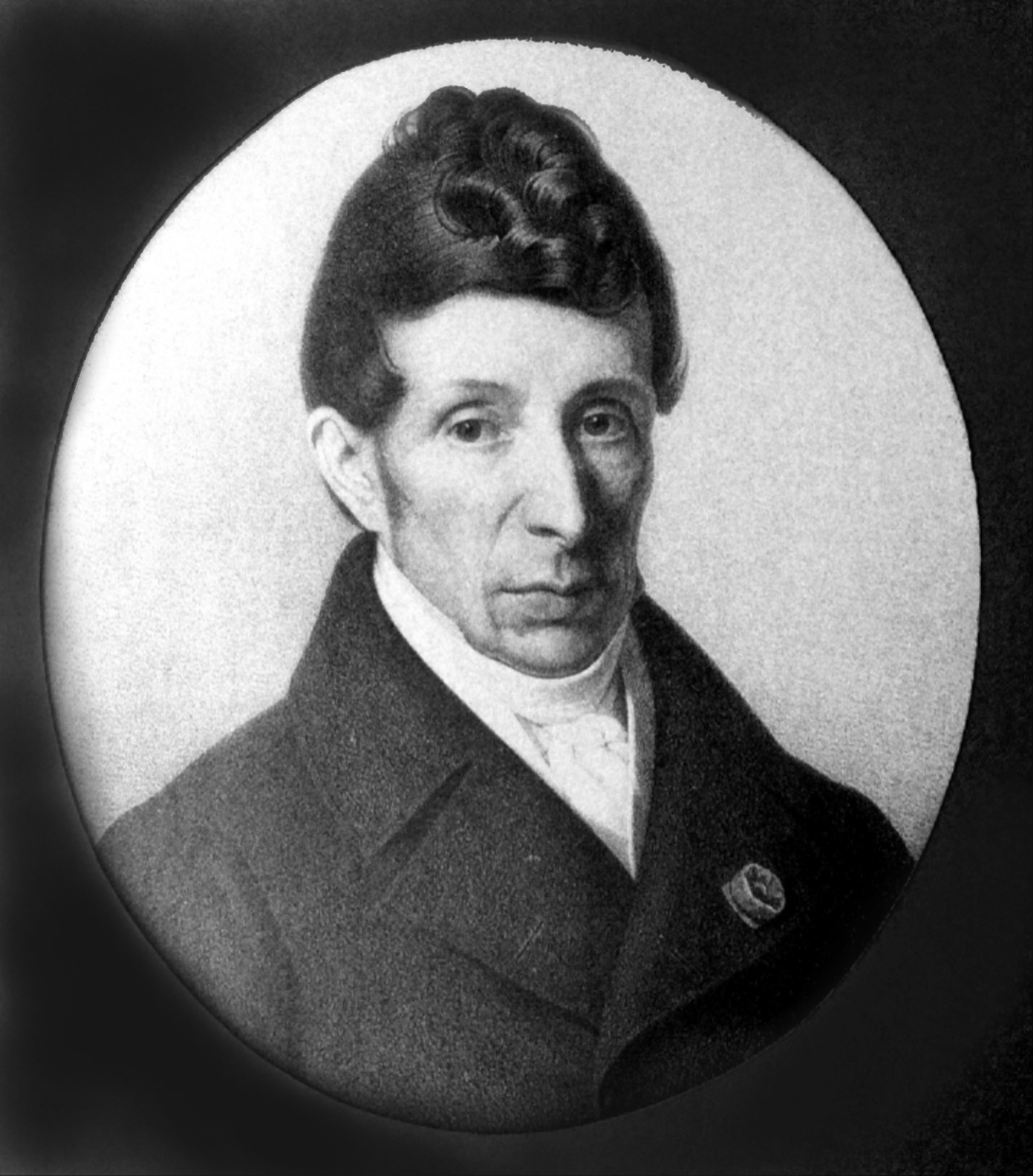 Mathieu de Dombasle, französischer Agronom und Zuckerfabrikant; Bild im Zucker-Museum Berlin